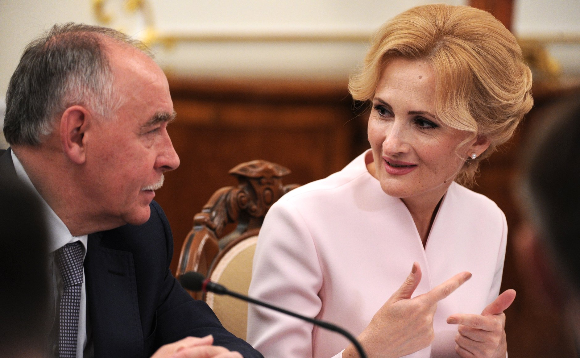 Директор Федеральной службы по контролю за оборотом наркотиков Виктор Иванов и председатель Комитета Государственной Думы по безопасности и противодействию коррупции Ирина Яровая перед началом заседания президиума Госсовета по вопросу реализации государственной антинаркотической политики